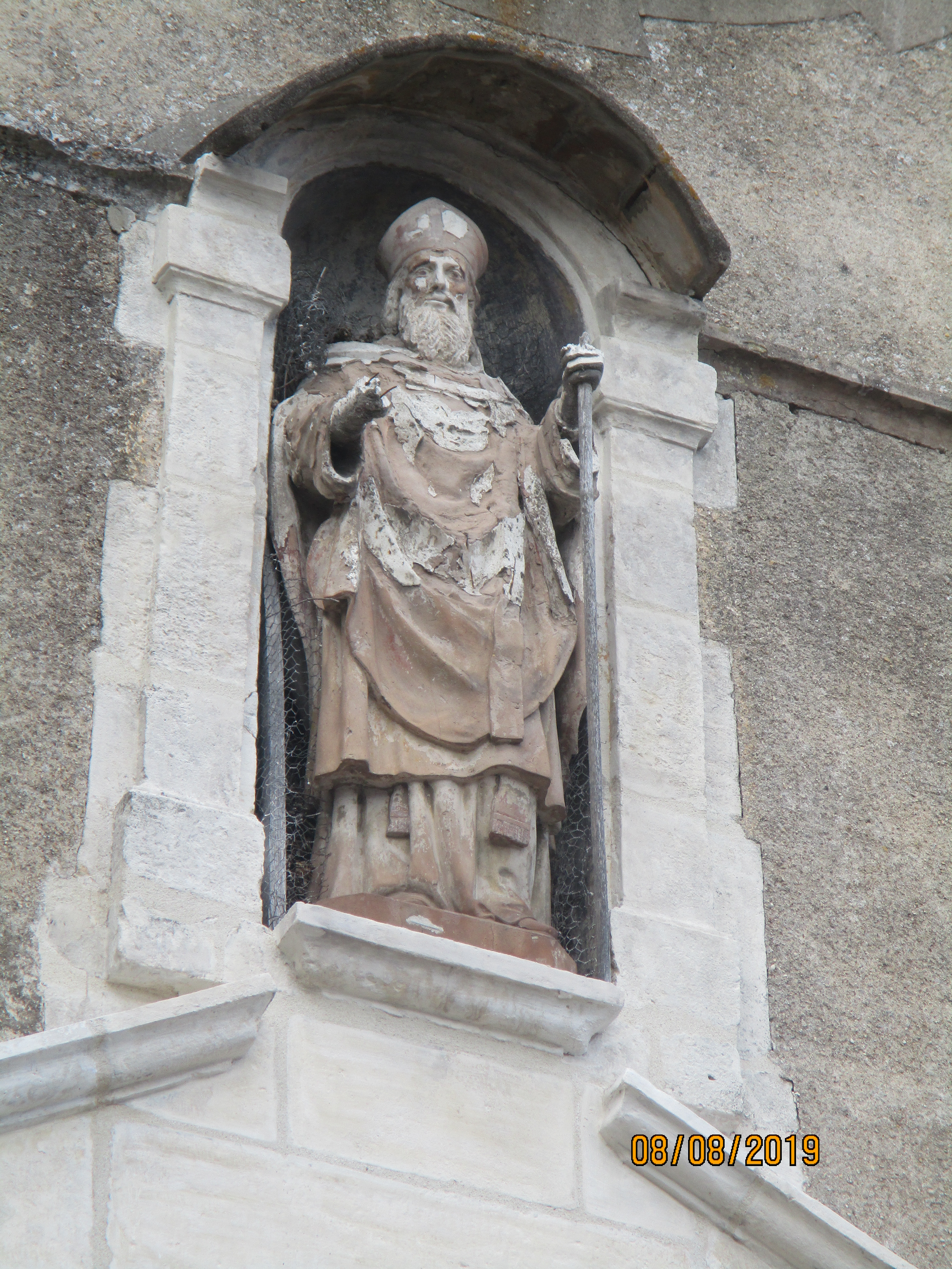 Église Saint-Savinien-le-Jeune de Sens : statue de saint Savinien.